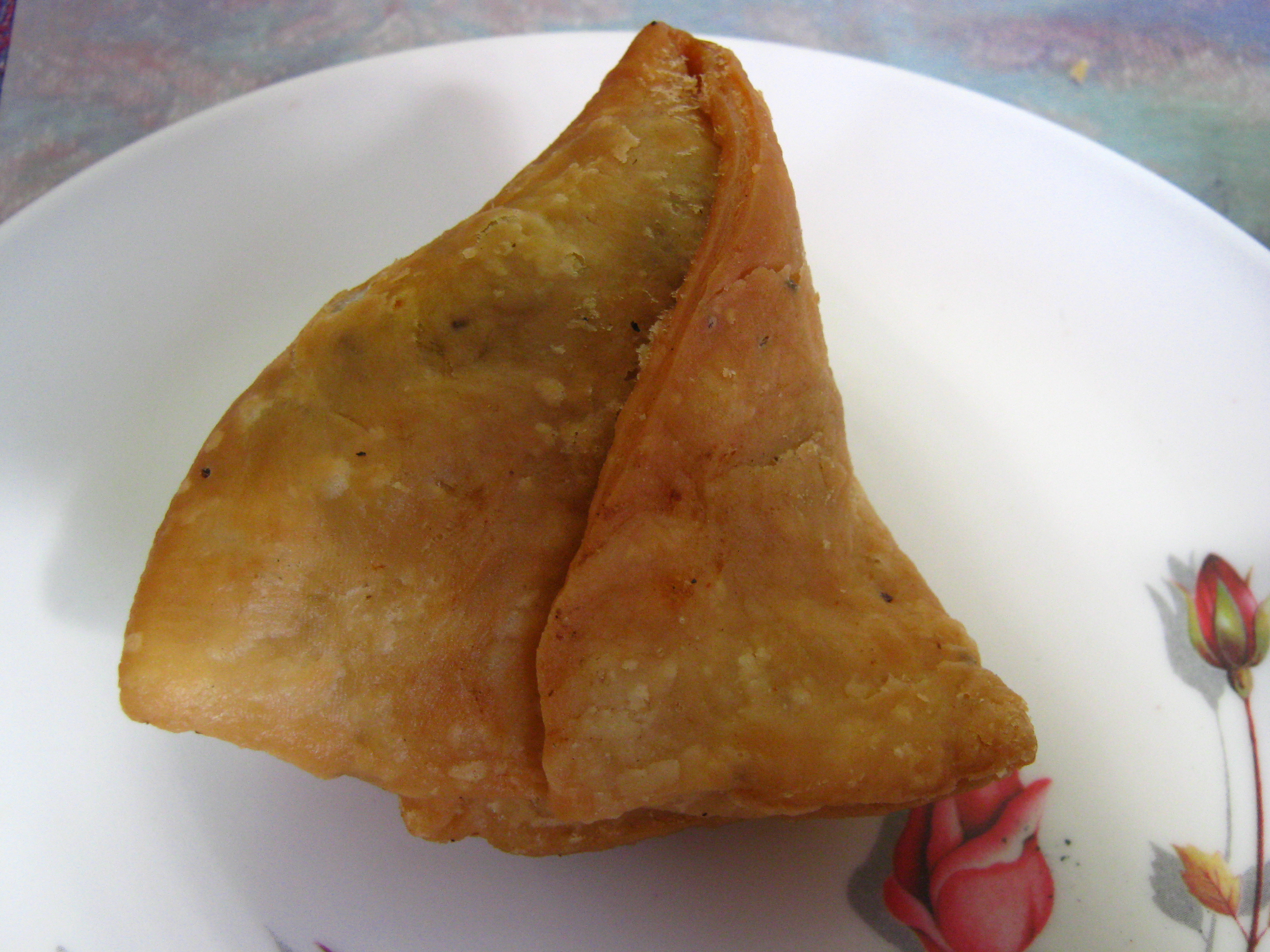 श्रेणी:अल्पाहार श्रेणी:भारतीय खाना